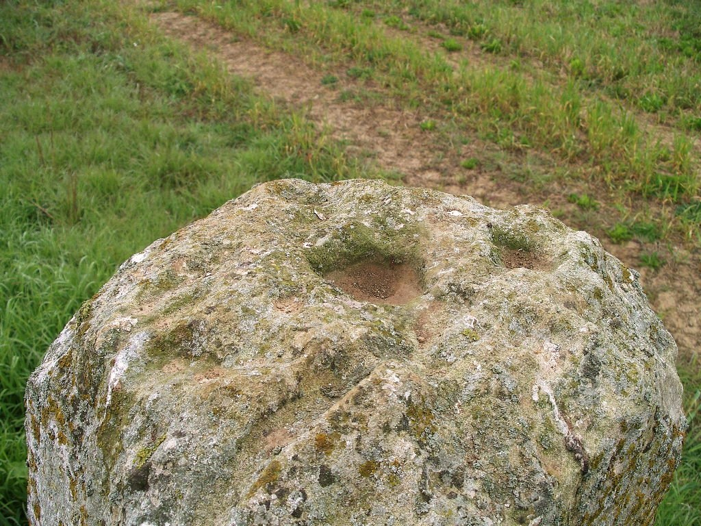 Menhir des Planches à Amblie (Calvados)